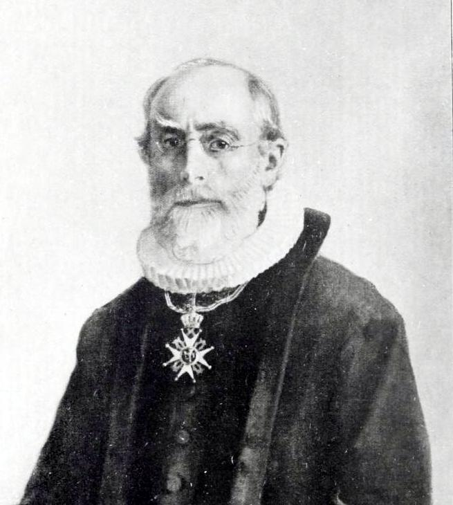 Portrett av Thorvald Klaveness